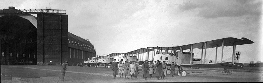 Beim Kagohl III, die Englandflieger Kommandierende General der Luftstreitkräfte Ernst von Hoeppner auf Inspektion Lokalität Flugplatz Melle - Gontrode (Belgien), im Hintergrund die grosse Zeppelin Halle. Man beachte die Gotha links, eines der drei Führer - Flugzeuge, deutlich an der auffälligen Rumpfbemalung zu erkennen, die wohl leuchtend rot gewesen ist.